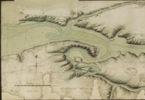 Plan de l'embouchure de l'Aulne et de celle de la Rivière du Faou ainsi que de la presqu'île de Landévennec (1779)